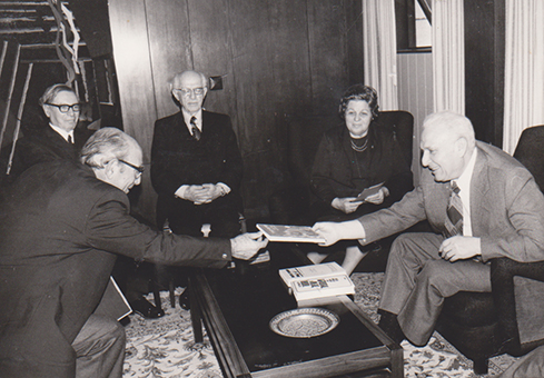 1977 - אגסי מוסר לנשיא אפרים קציר, את ספרו "חושם מבגדד"